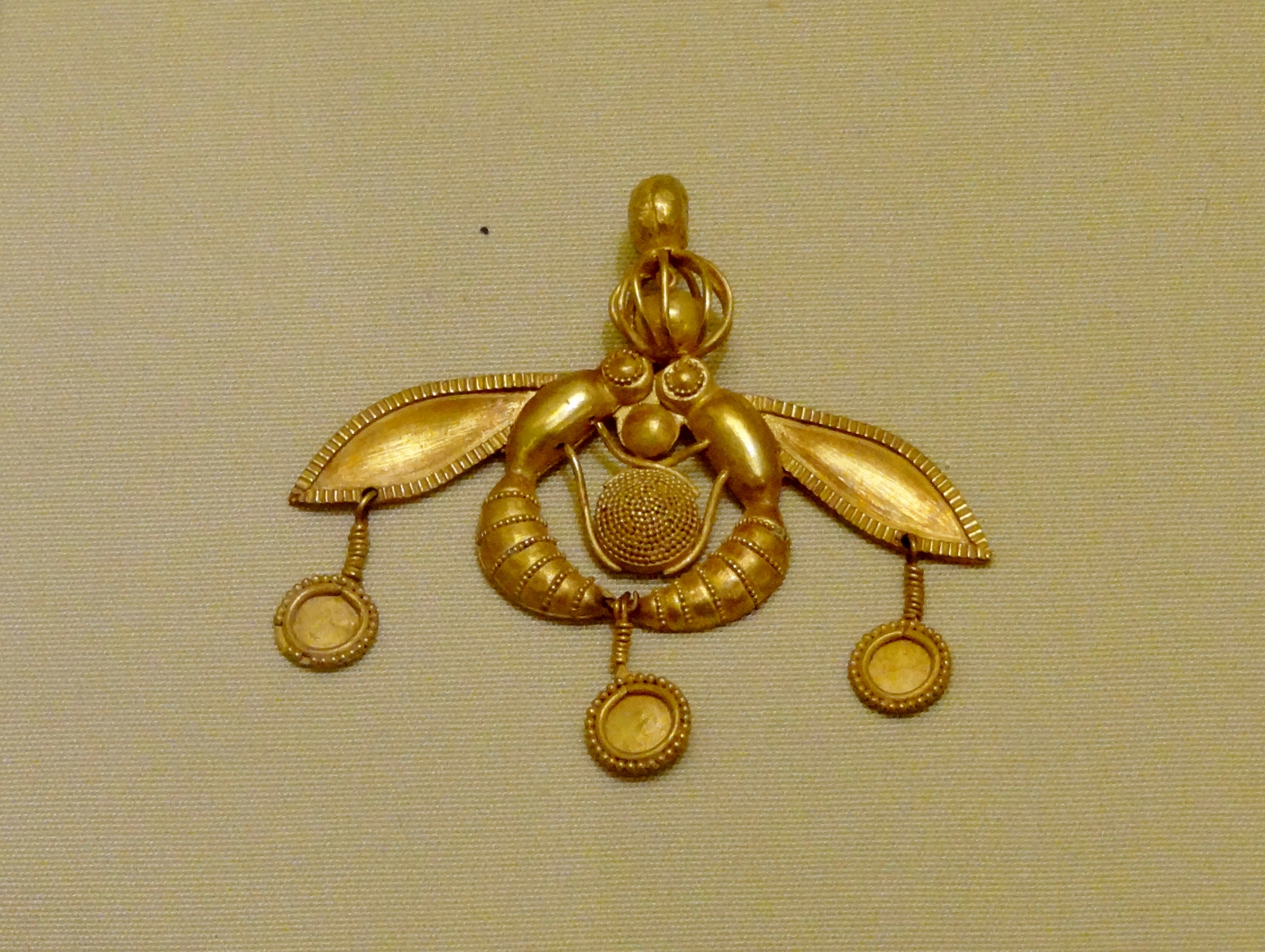 Goldschmuck zweier Bienen neben einer Wabe (1700–1550 v. Chr.) aus einem Grab der Nekropole von Chrysolakkos beim Palast von Malia, ausgestellt im Archäologischen Museum Iraklio, Kreta, Griechenland